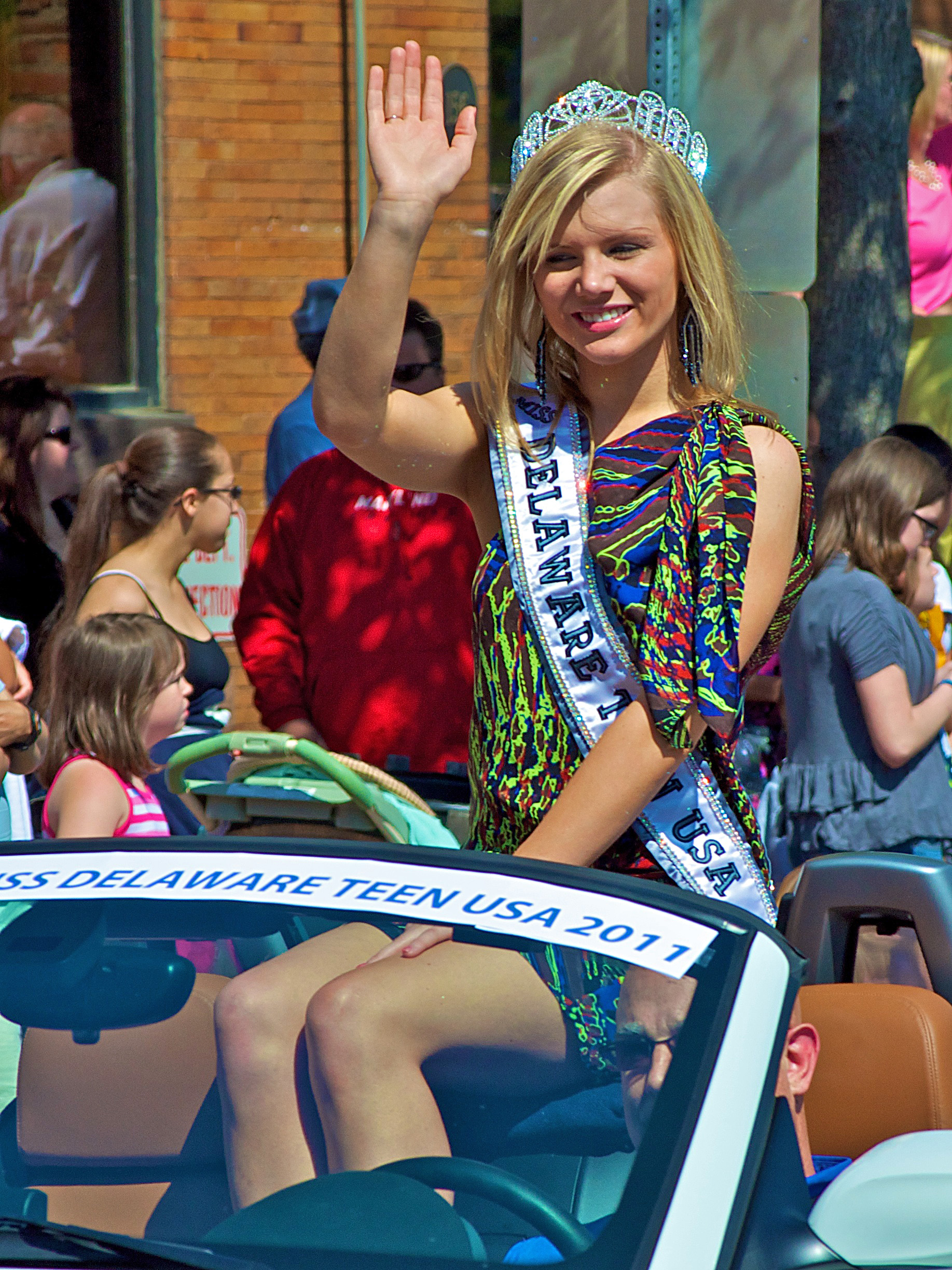 Amanda Debus, Miss Delaware Teen USA 2011